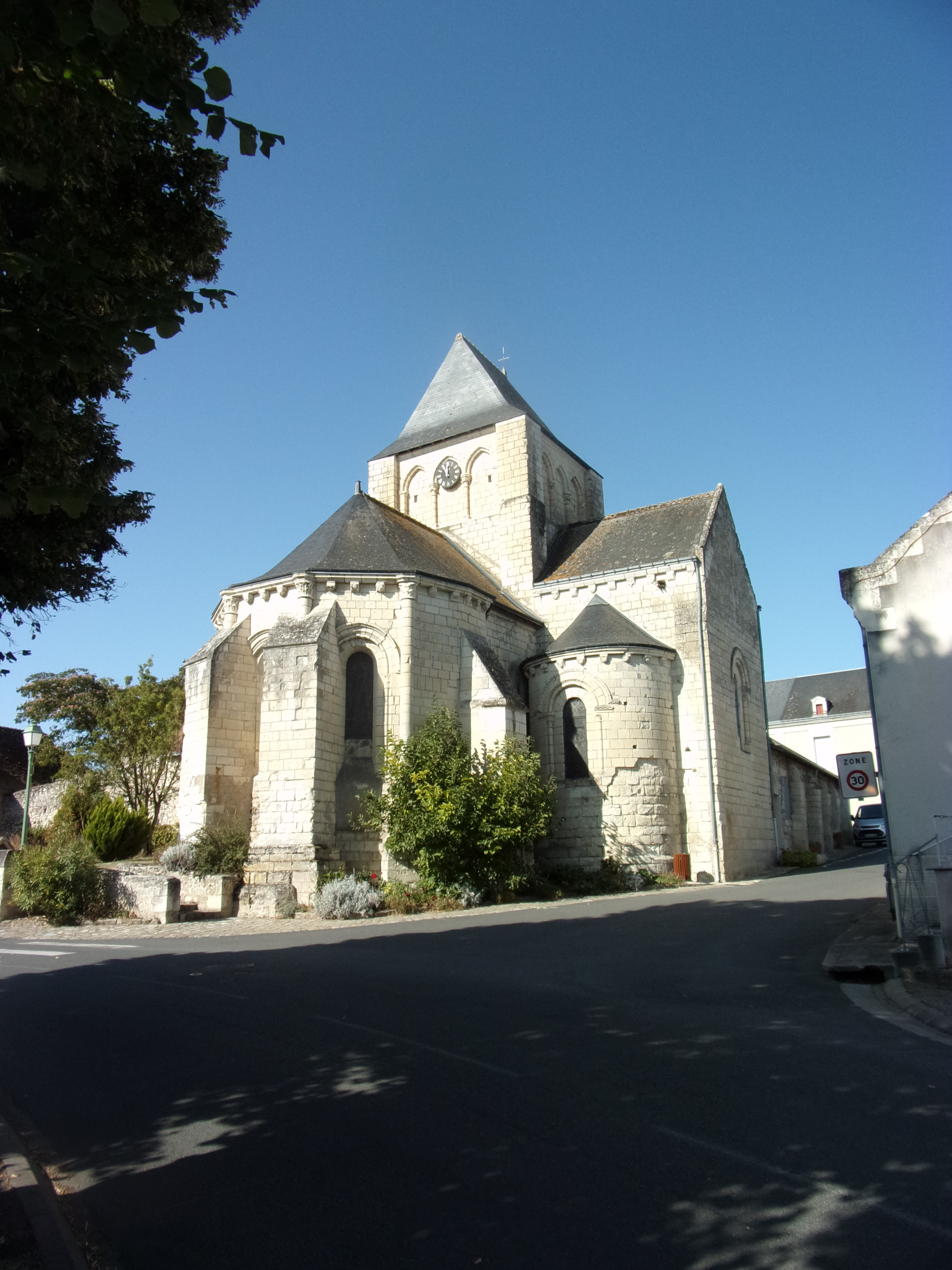 Eglise Notre-Dame de Crouzilles